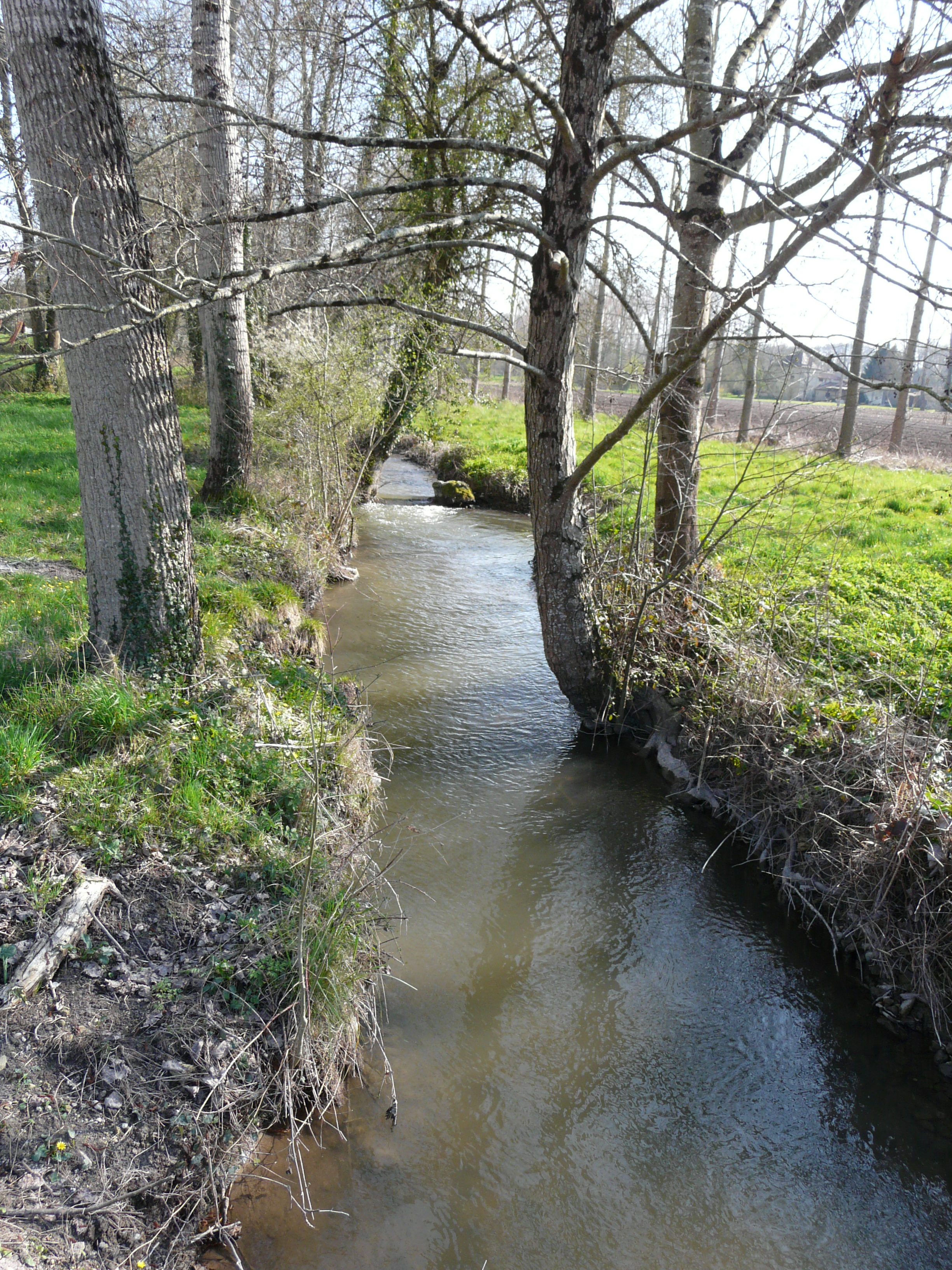 La Peychay au lieu-dit le Grand Champ, entre Saint-Pardoux-de-Drône (à gauche) et Saint-Martin-de-Ribérac (à droite). Vue prise en direction de l'amont.